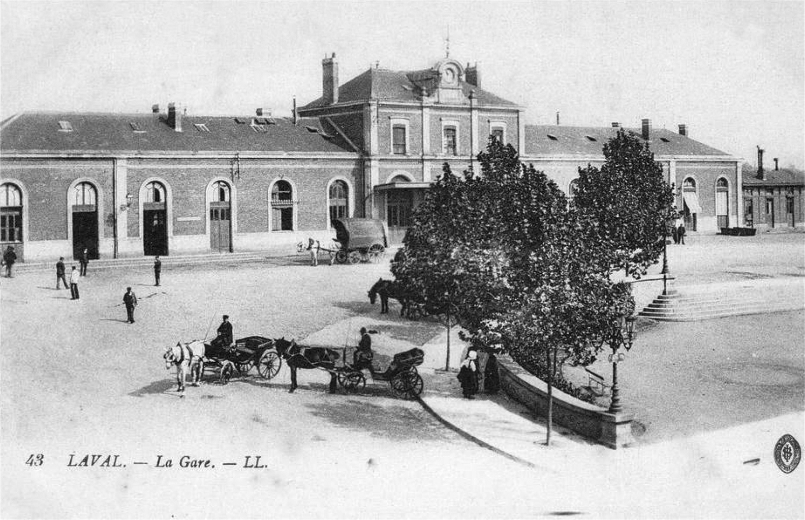 La façade extérieure du bâtiment voyageurs et la cours de la gare de Laval vers 1900.